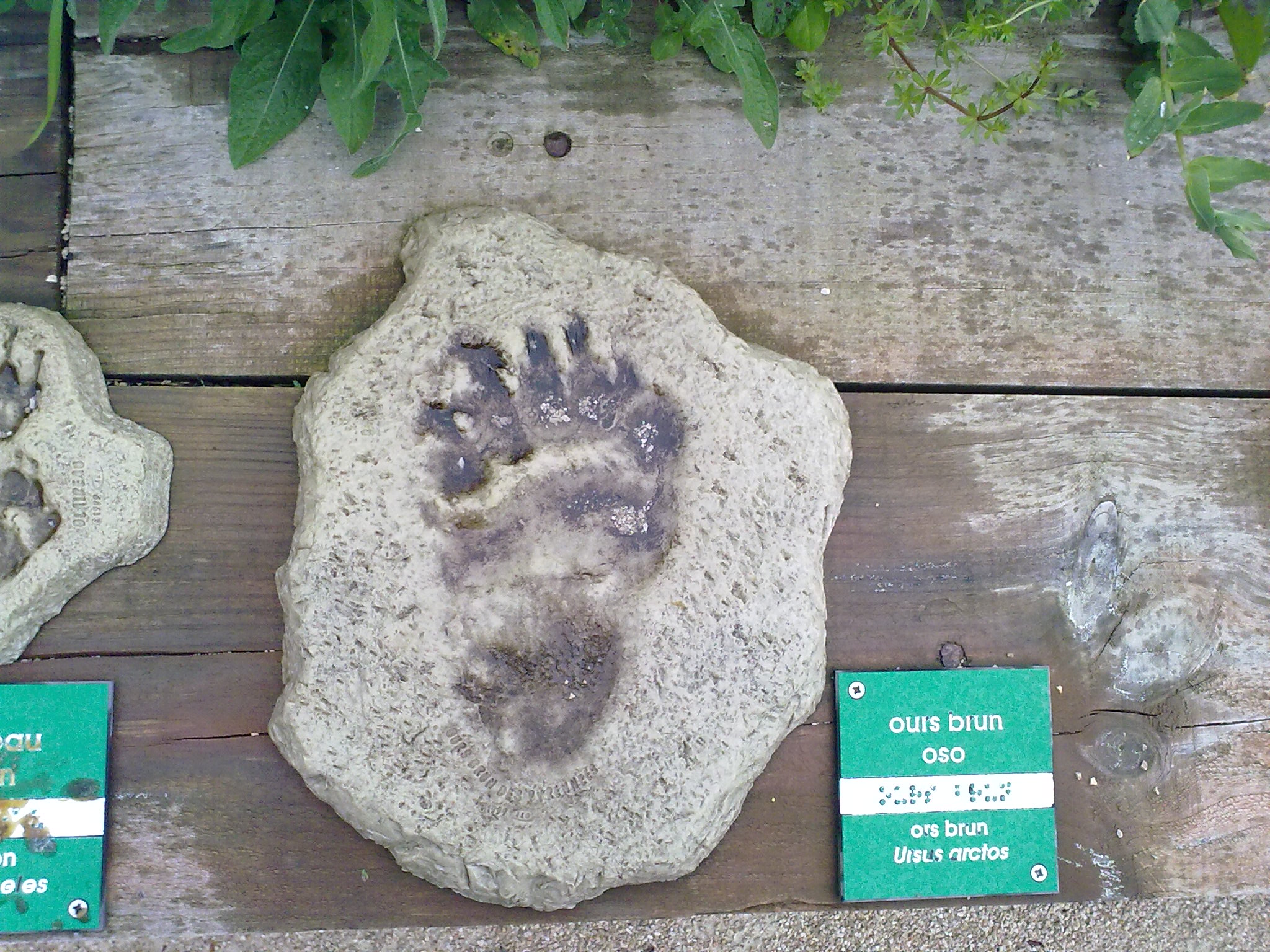 Etsaut, France